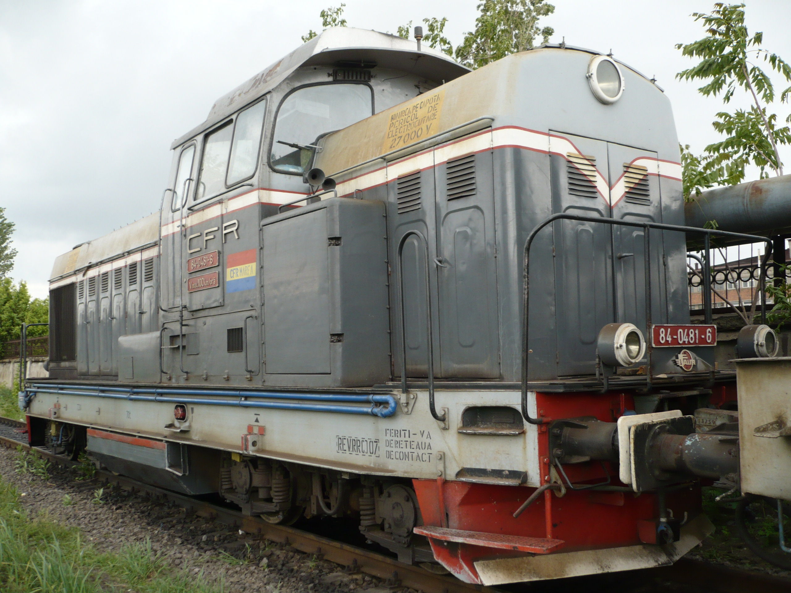 Locomotiva CFR clasa 84 (veche) a CFR Marfă